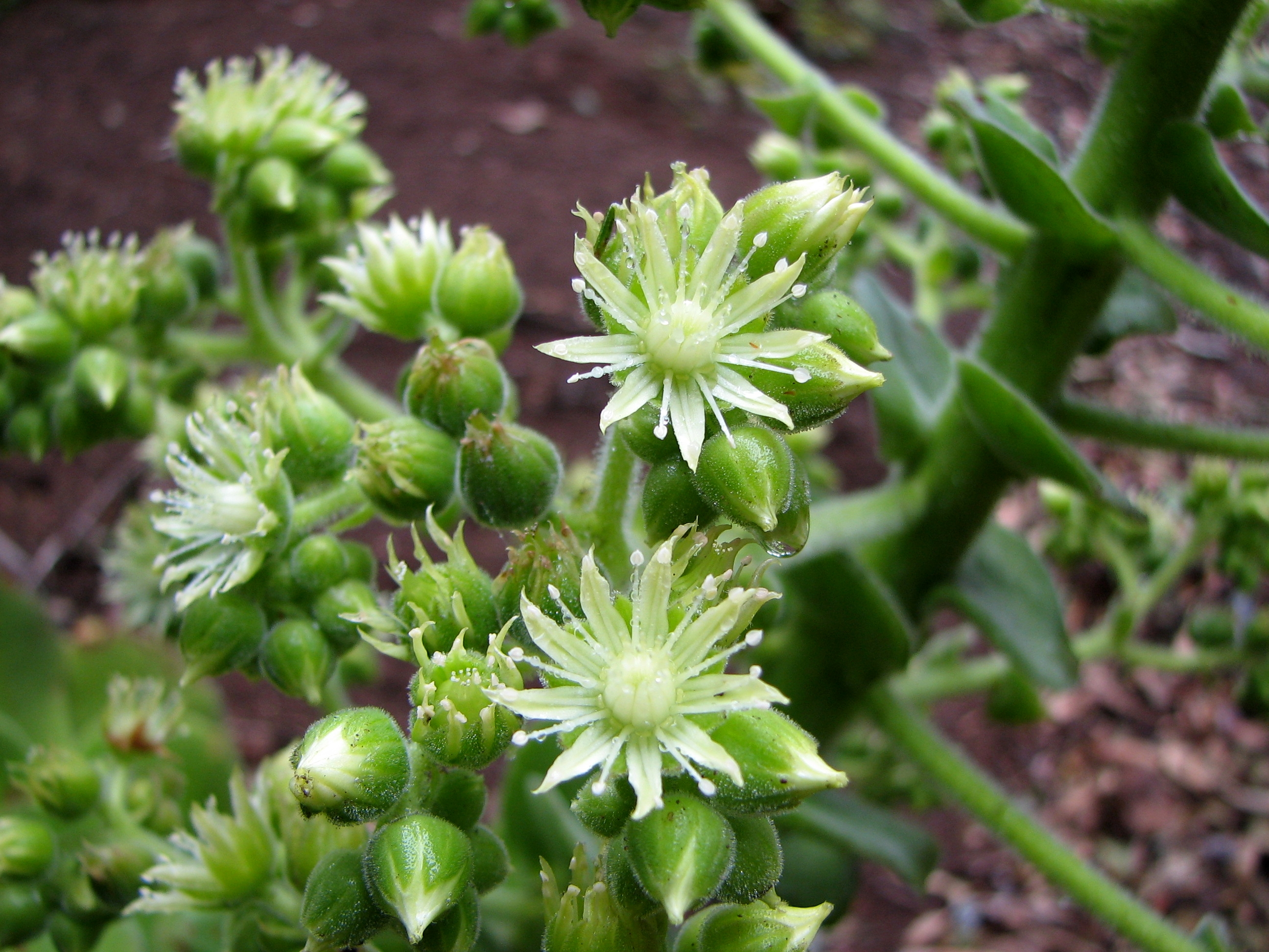 Bejeque (Aeonium canariense). Detalle de la flor.